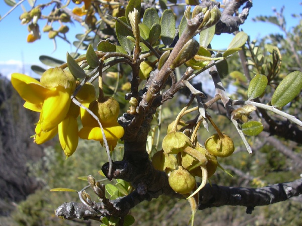 Sophora chrysophylla flower details